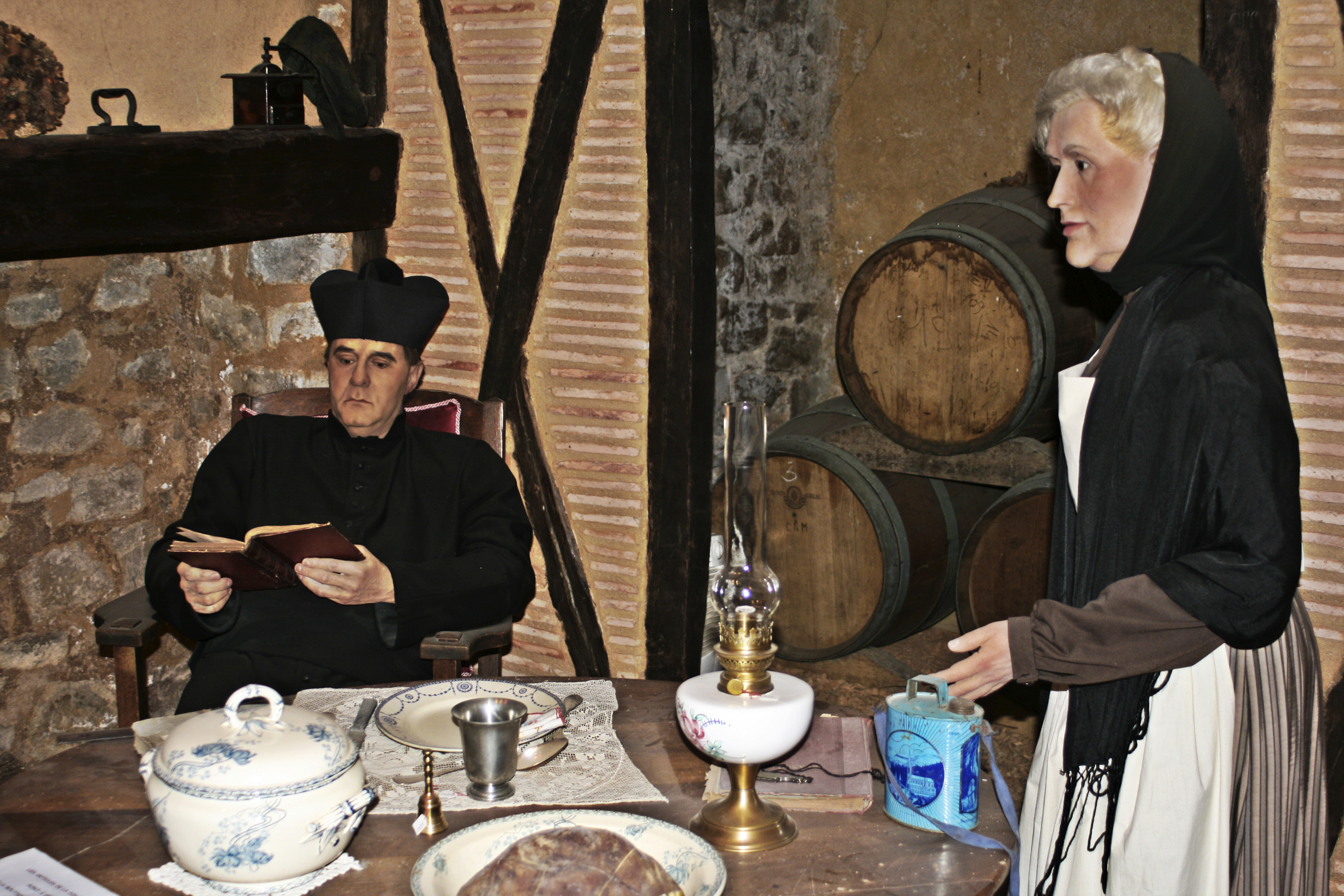 figuracion del abad Bérenger Saunière en Rennes-le-Château (Francia) France